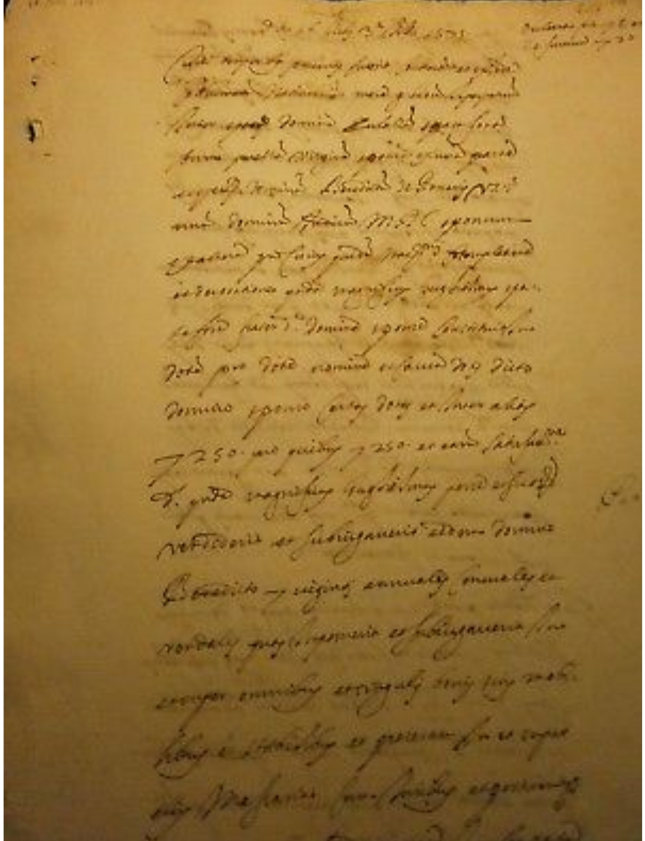 faith of nobility